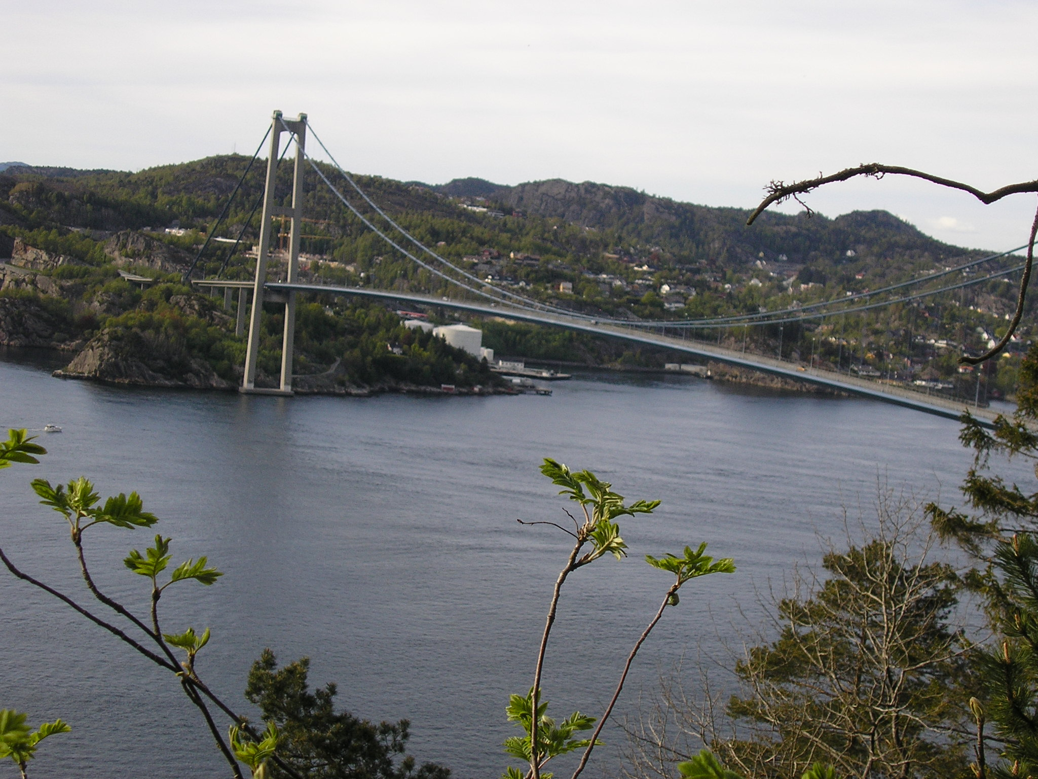 Askøybrua sett fra Olsvik mot Askøy